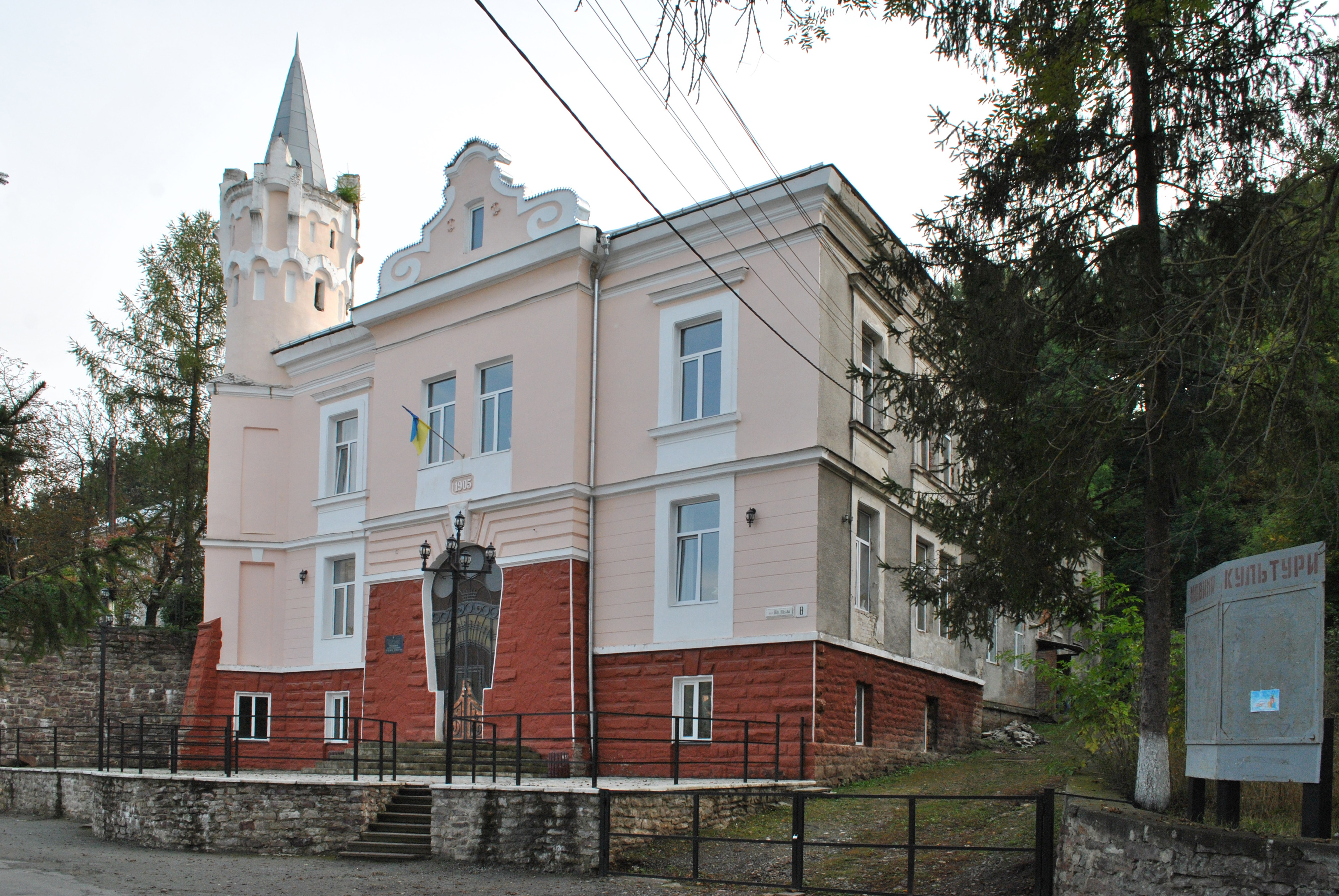 Пам'ятка архітектури місцевого значення в Бучачі: Будинок-читальня на вул. Шкільній, 8.